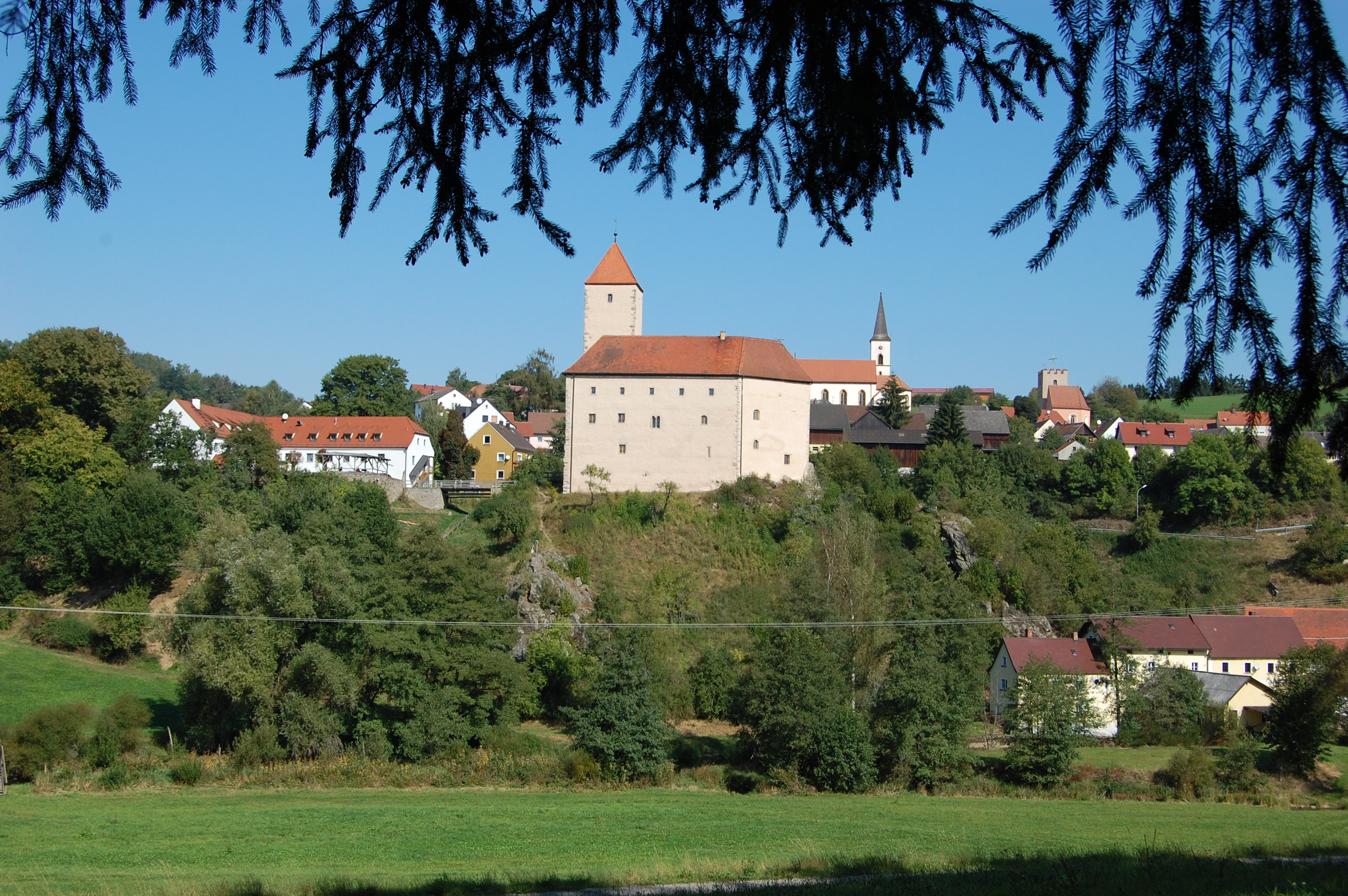 Burg Trausnitz im Tal: wird als Jugendherberge genutzt.